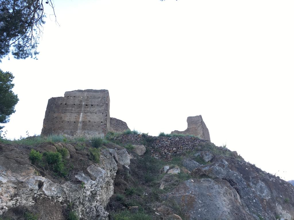 La imagen muestra el Castillo arabe de Segart (Valencia)